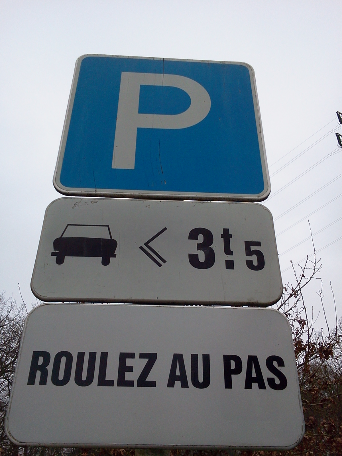 Verkéiersschëld E, 23 aus dem Lëtzebuerger Code de la route "Parking" mam Zousazschëld Modell 1 an enger Indikatioun fir mat Schrëttgeschwindegkeet ze fueren.